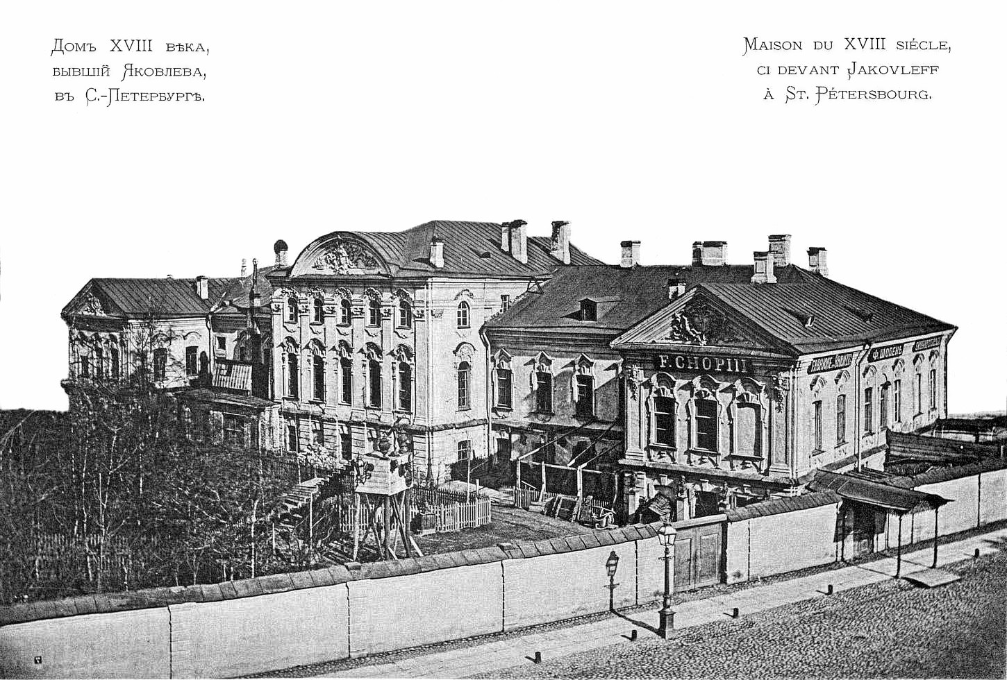 Особняк С. Я. Яковлева, существовавший в период с 1766 по 1901 годы.